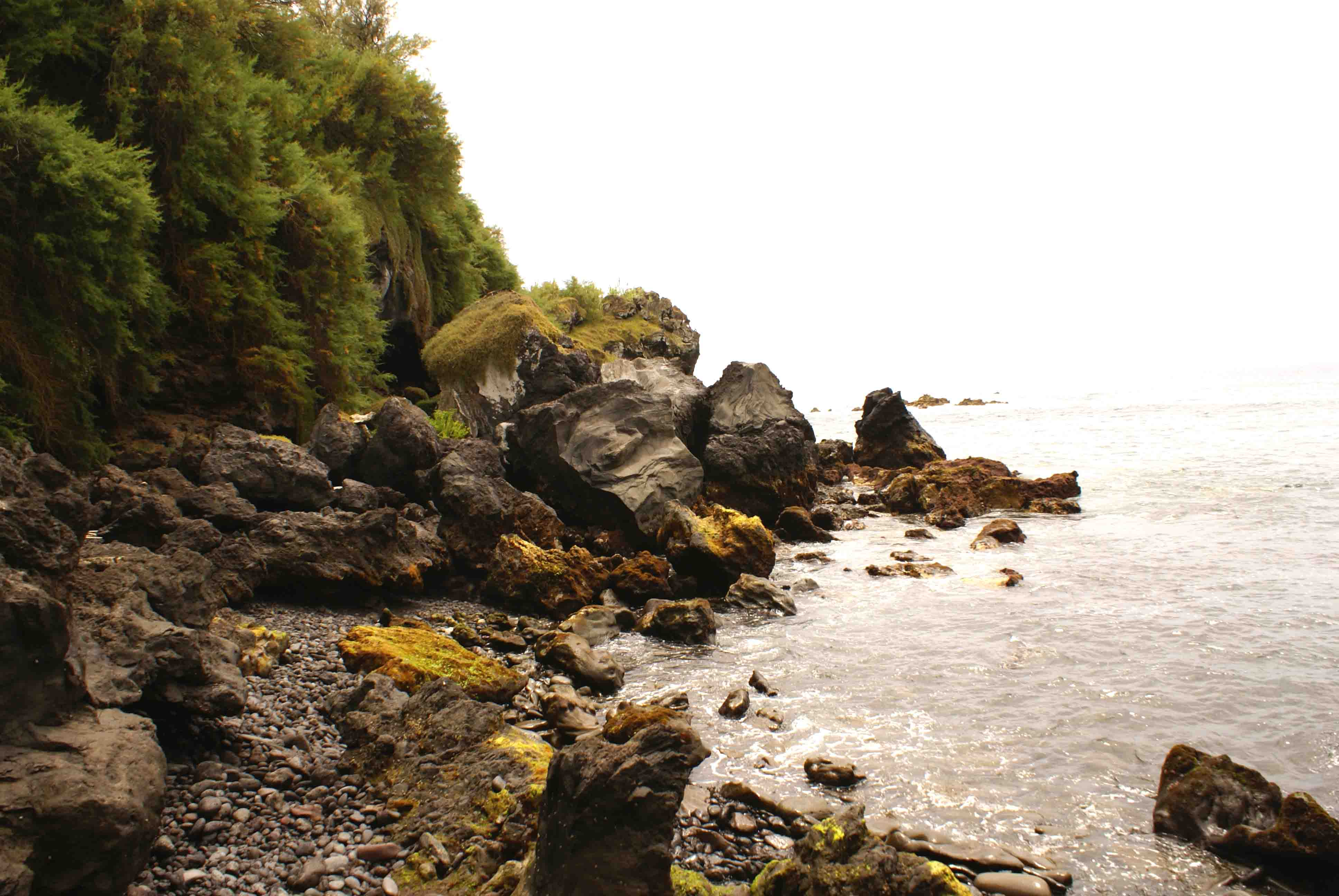 Uma das enseadas que formam a Baía de Vila Maria, ilha Terceira, Açores, Portugal